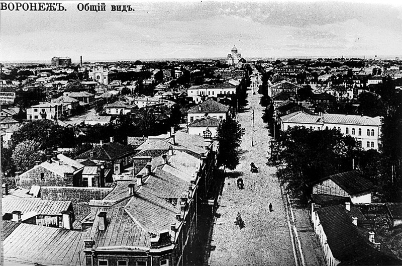 Воронеж. Общий вид 5